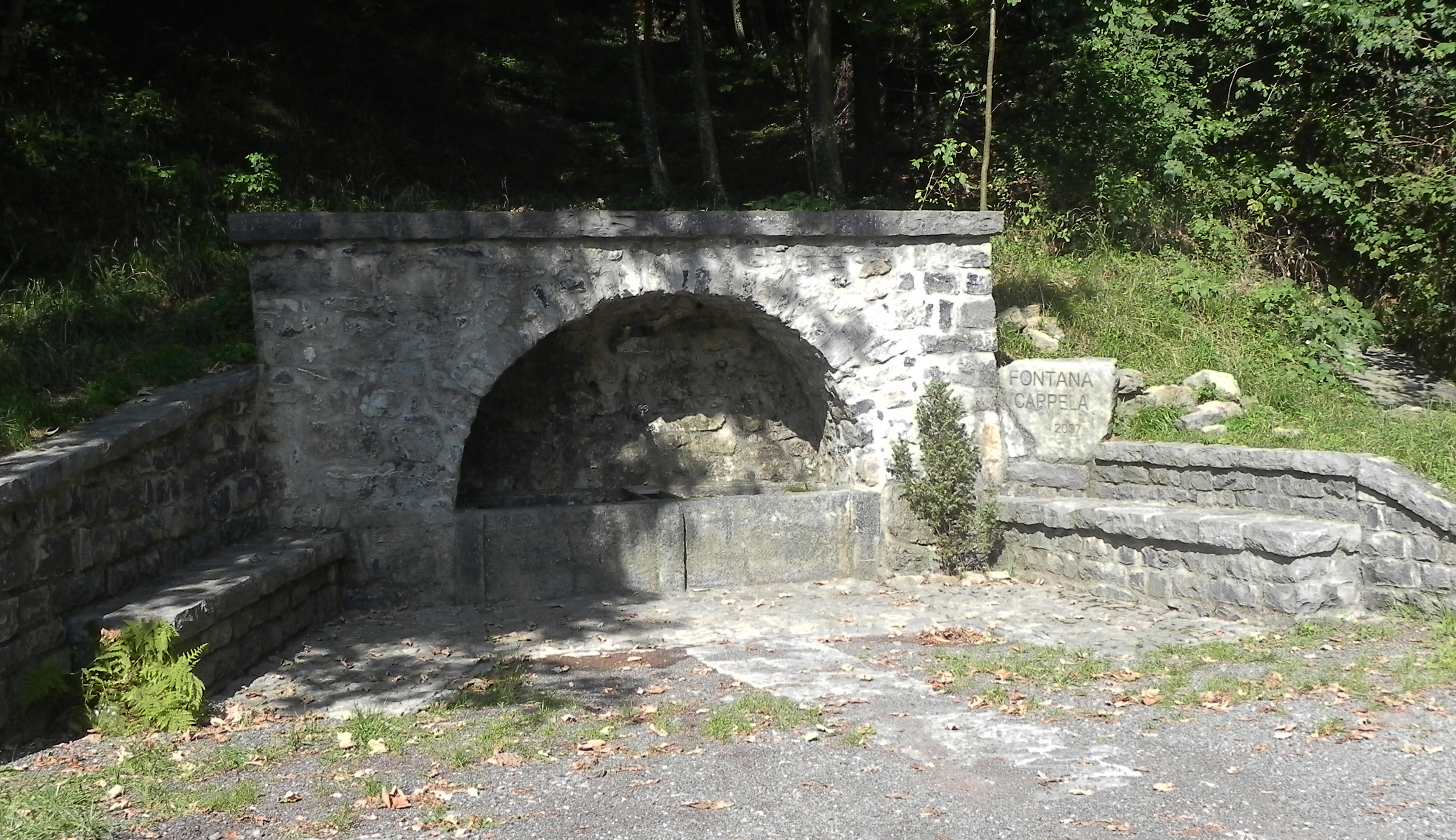 Gorno (BG) - Fontana in localita Carpela